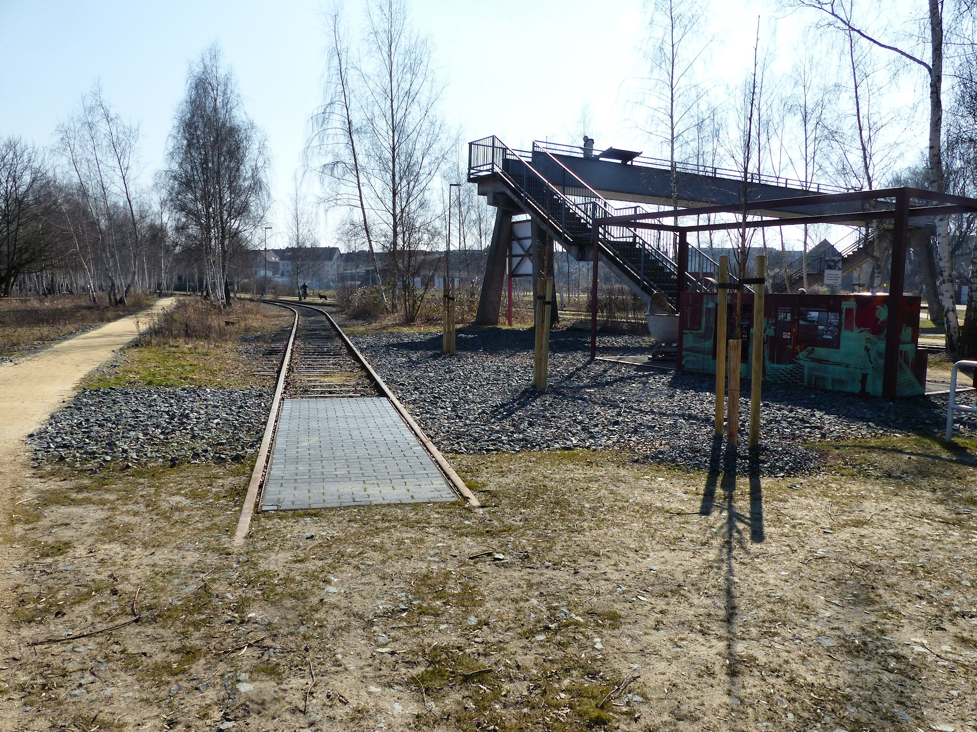 Gelände des Westbahnhofs mit "Sinnloser Brücke", Blickrichtung Süden, März 2016.